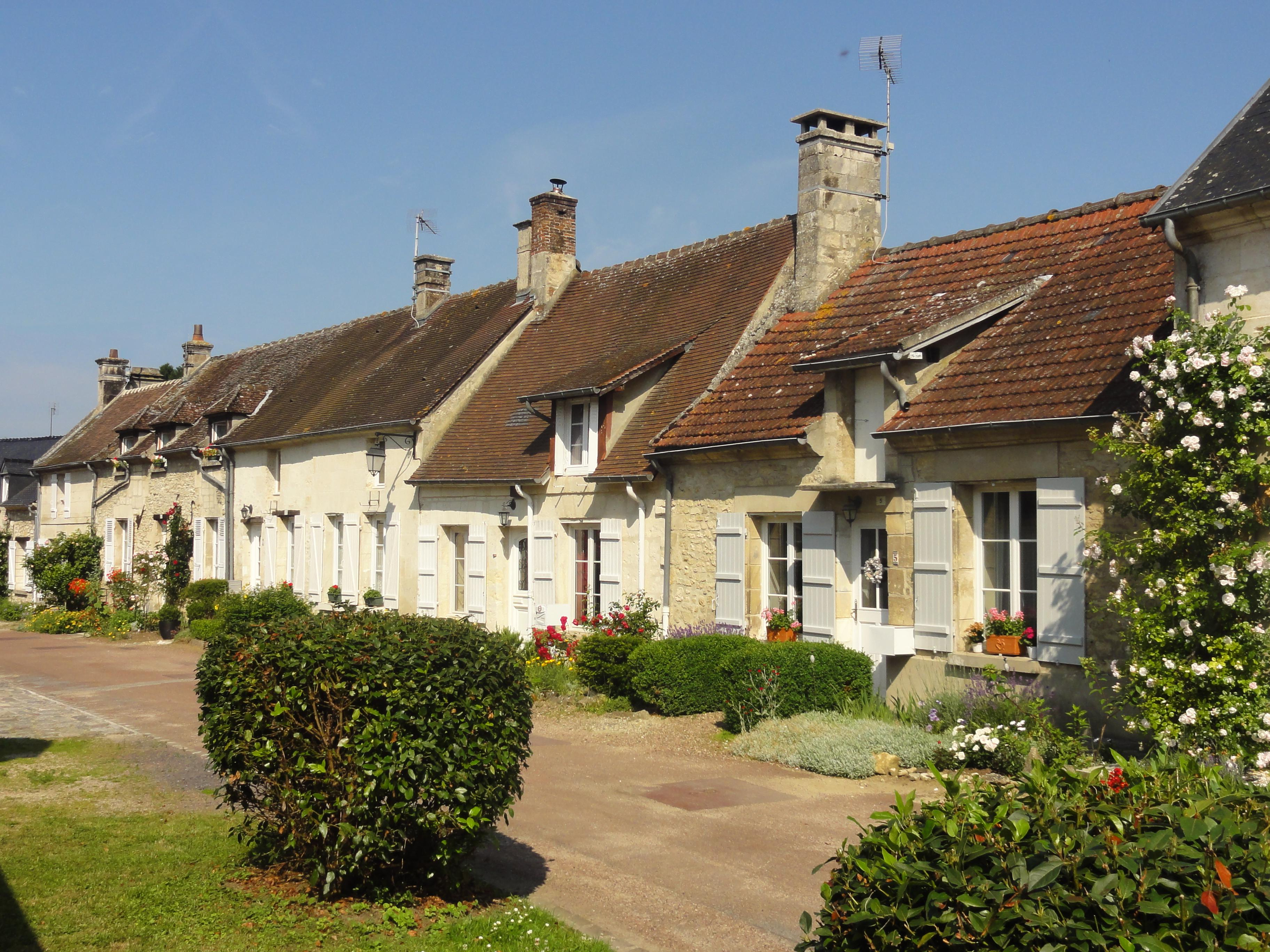 Rue des Abbesses.